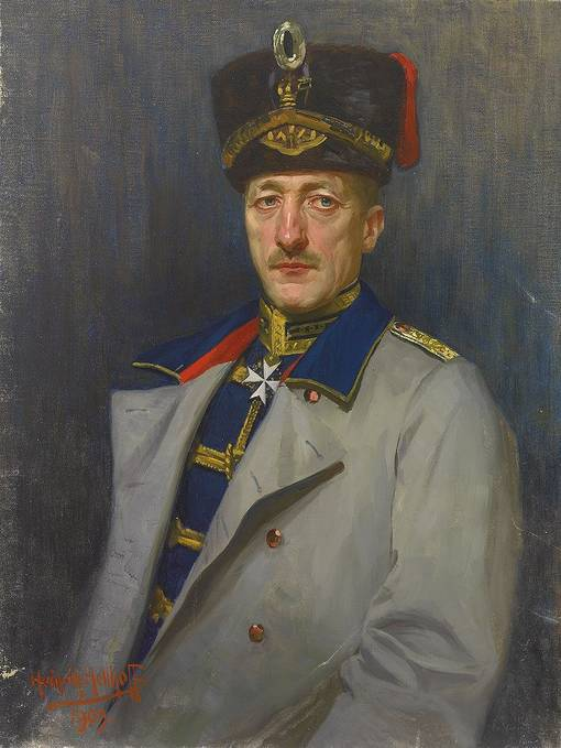 Heinrich Hellhoff - Portrait des Generals Paul Freiherr von Schoenaich, ordensgeschmückt, 1909. Öl/Lwd. 90 x 69 cm